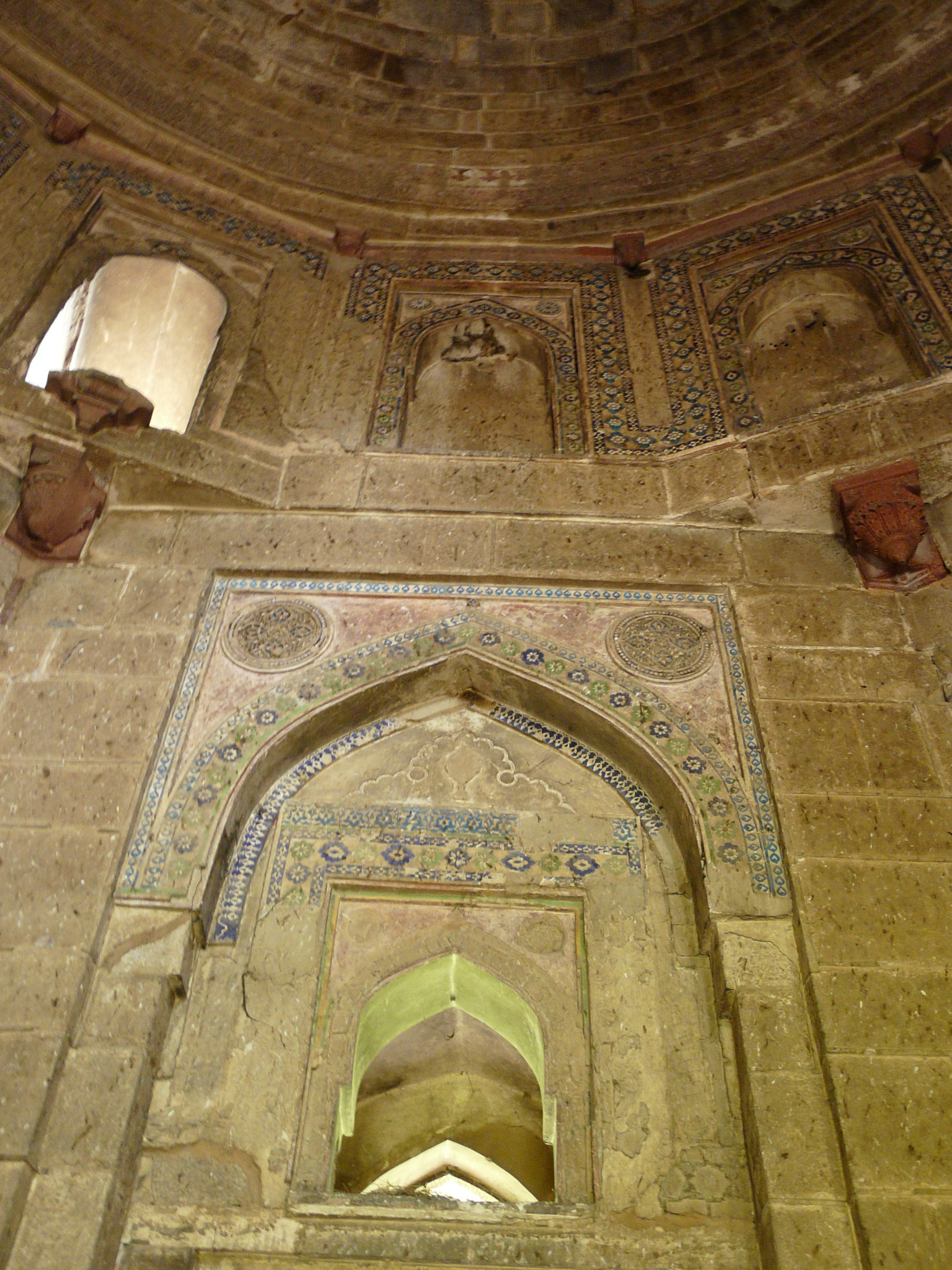 Sikandar Lodhi's tomb interior tilework Sikander Lodi's Tomb